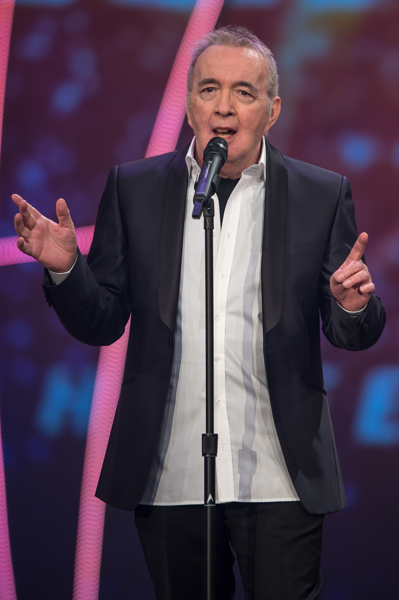 BR,Barry Ryan,Bayerisches Fernsehen,Frankenhalle,Live-Sendung,Sternstunden-Gala,Sternstundengala